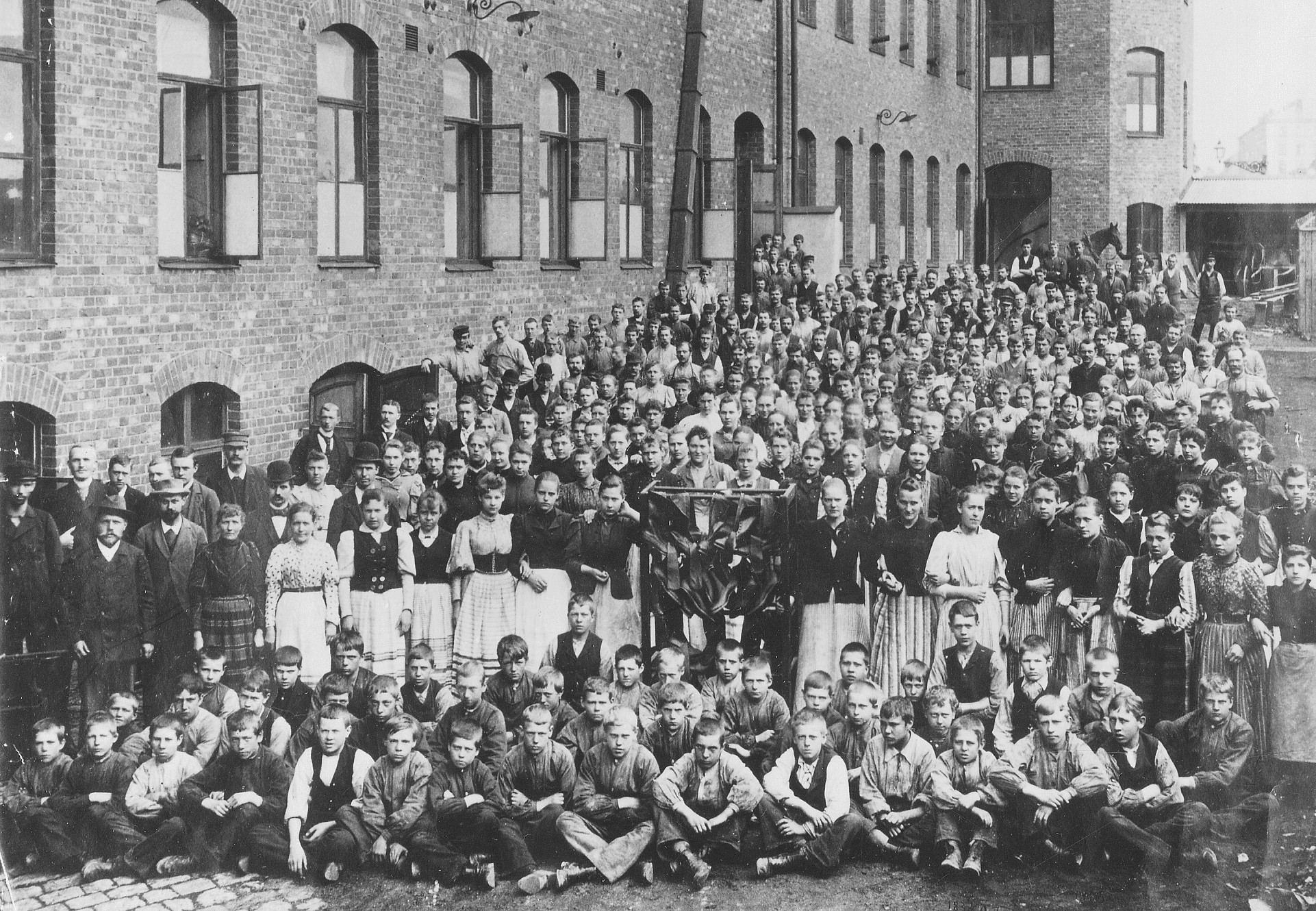 AB Stockholms Skofabrik, personal